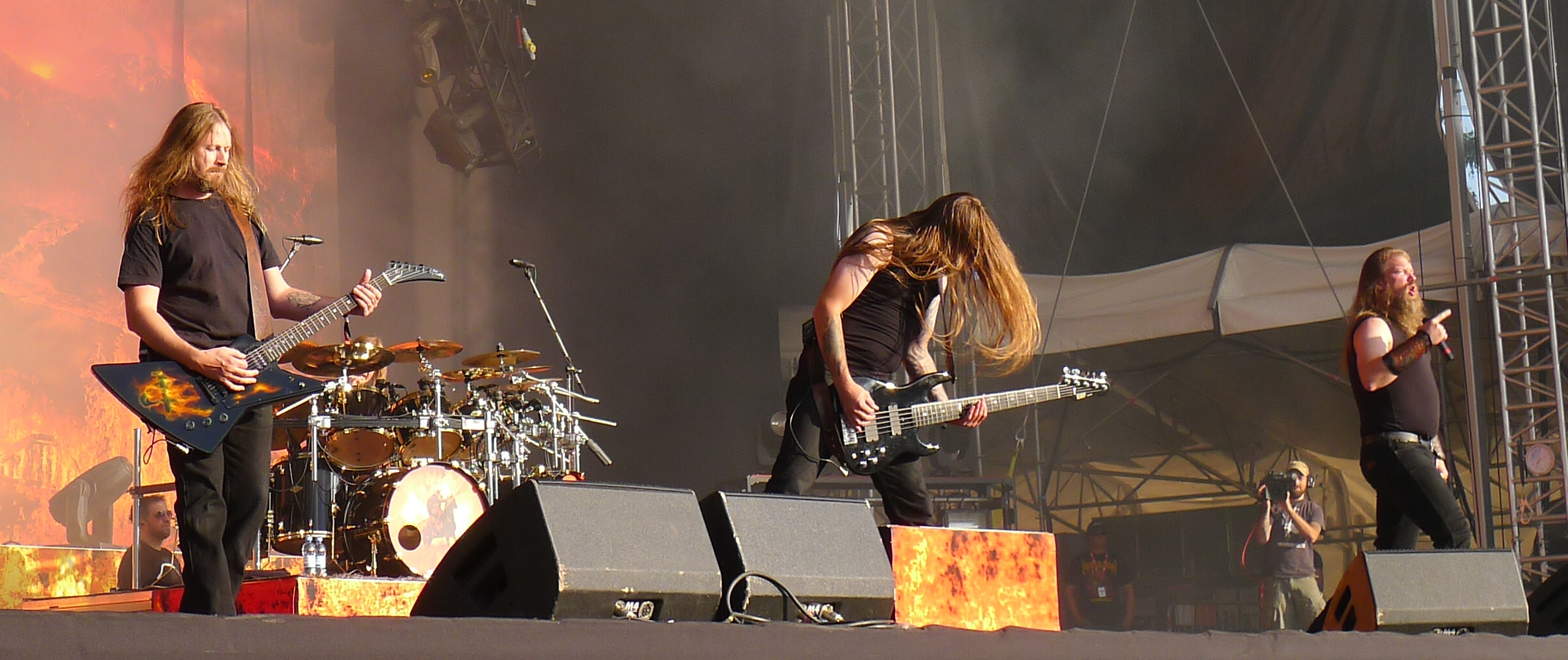 Amon Amarth live am Tuska Open Air 2011